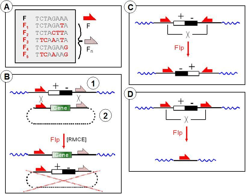 A: Secuencias de sitios de FRT de tipo silvestre (F) y mutantes (Fn) , B: Integración, C: Inversión, D: Eliminación, 1: Aceptor constructo, 2: Donador constructo (plasmido, (Nota: Gráfico ha sido modificado a partir de J. Bode)